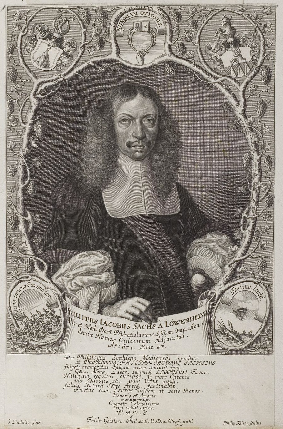 Grafik aus dem Klebeband Nr. 3 der Fürstlich Waldeckschen Hofbibliothek Arolsen Motiv: Philipp Jacob Sachs von Lewenheimb (1627-1672), Stadtphysikus in Breslau; Mitglied der Leopoldina GND: 117599719